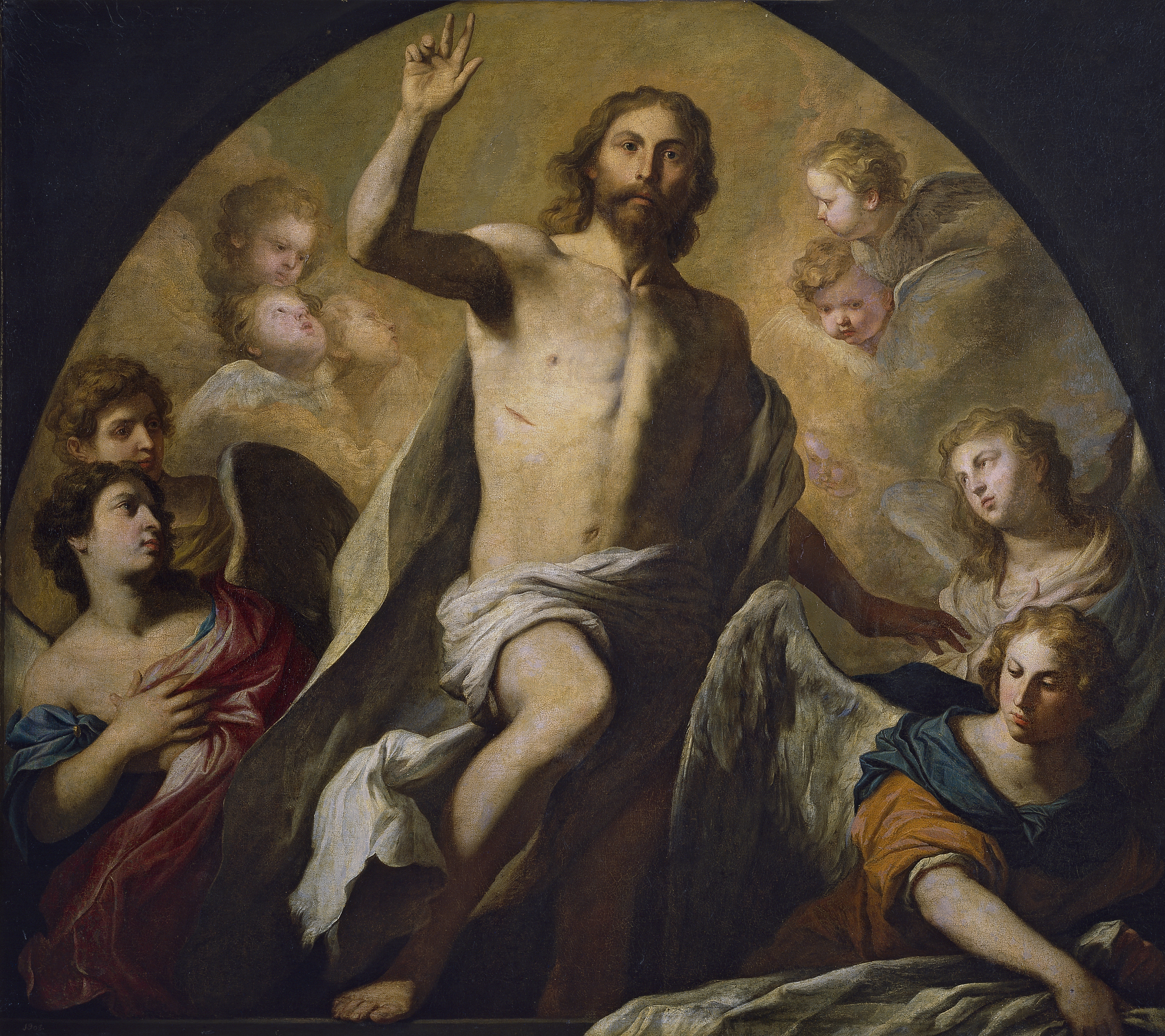 La obra representa a Jesucristo resucitado de entre los muertos.